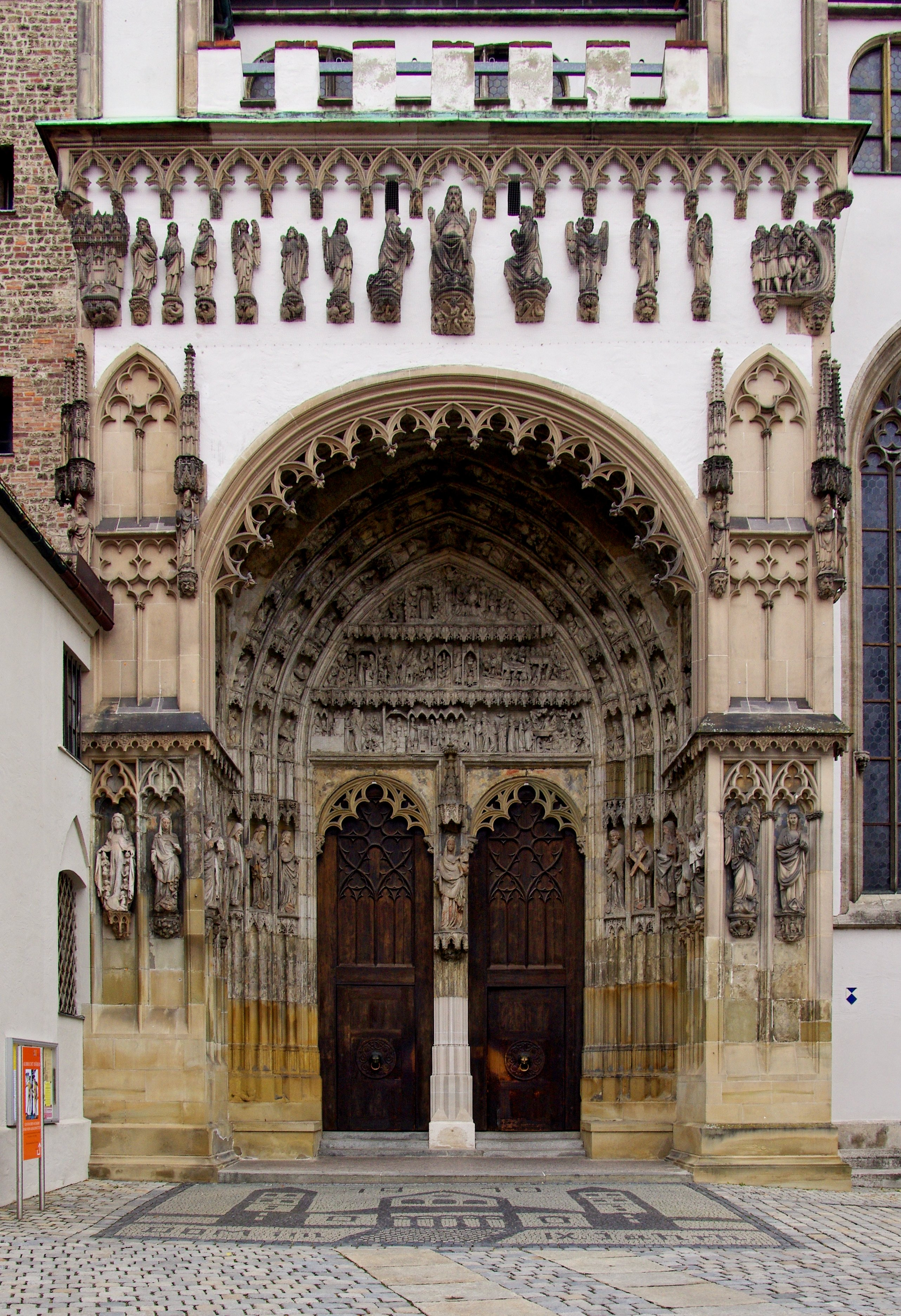 Bilder von dem Augsburger Dom. Das Südportal